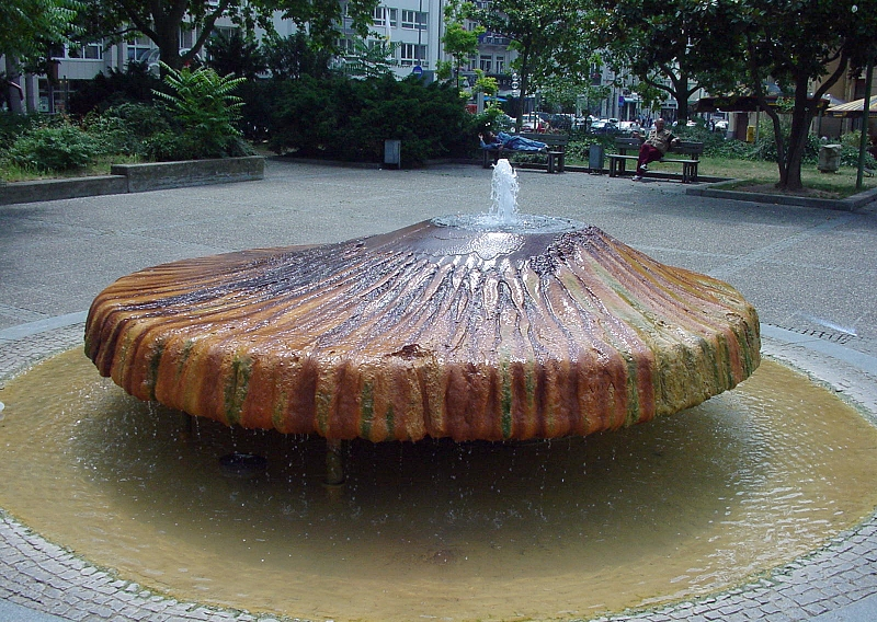 Der „Kochbrunnenspringer“ des Kochbrunnens in Wiesbaden, Deutschland. Der Springbrunnen ist ein Auslauf der ergiebigen Thermalquelle, eine der sogenannten Primärquellen der Stadt. Ein weiterer kleiner Teil des Wassers speist die Trinkstelle im Kochbrunnenpavillon, der größte Teil wird in das weit verzweigte Thermalwasser-Leitungsnetz Wiesbadens geleitet und für medizinische Bäder und zu Heizzwecken verwendet.